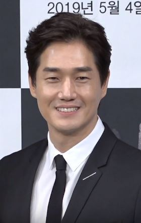 배우 유지태와 이요원이 2일 오후 서울 마포구 상암 MBC 골든마우스홀에서 진행된 MBC 특별기획드라마 '이몽' 제작발표회에 참석했다.